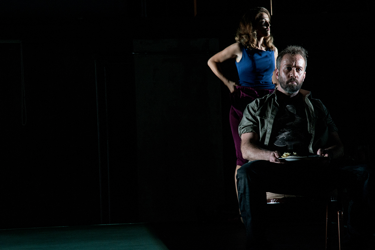 A New Opera by Donnacha Dennehy and Enda Walsh Edinburgh International Festival André de Ridder Conductor